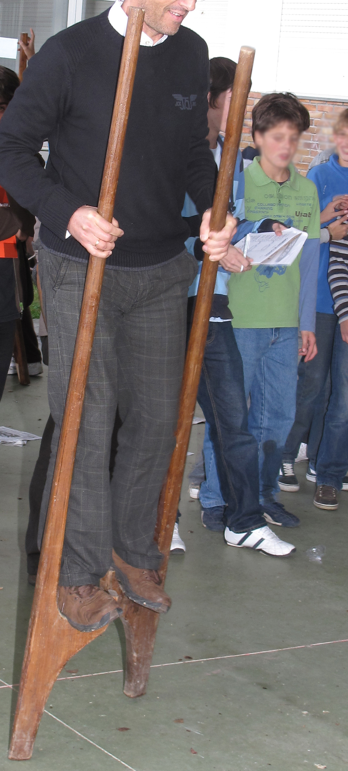 Zancos. Competición. Galiza